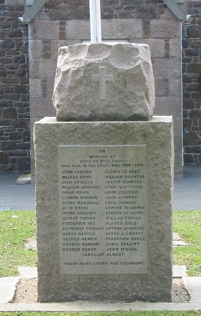 Nrf: Jèrri